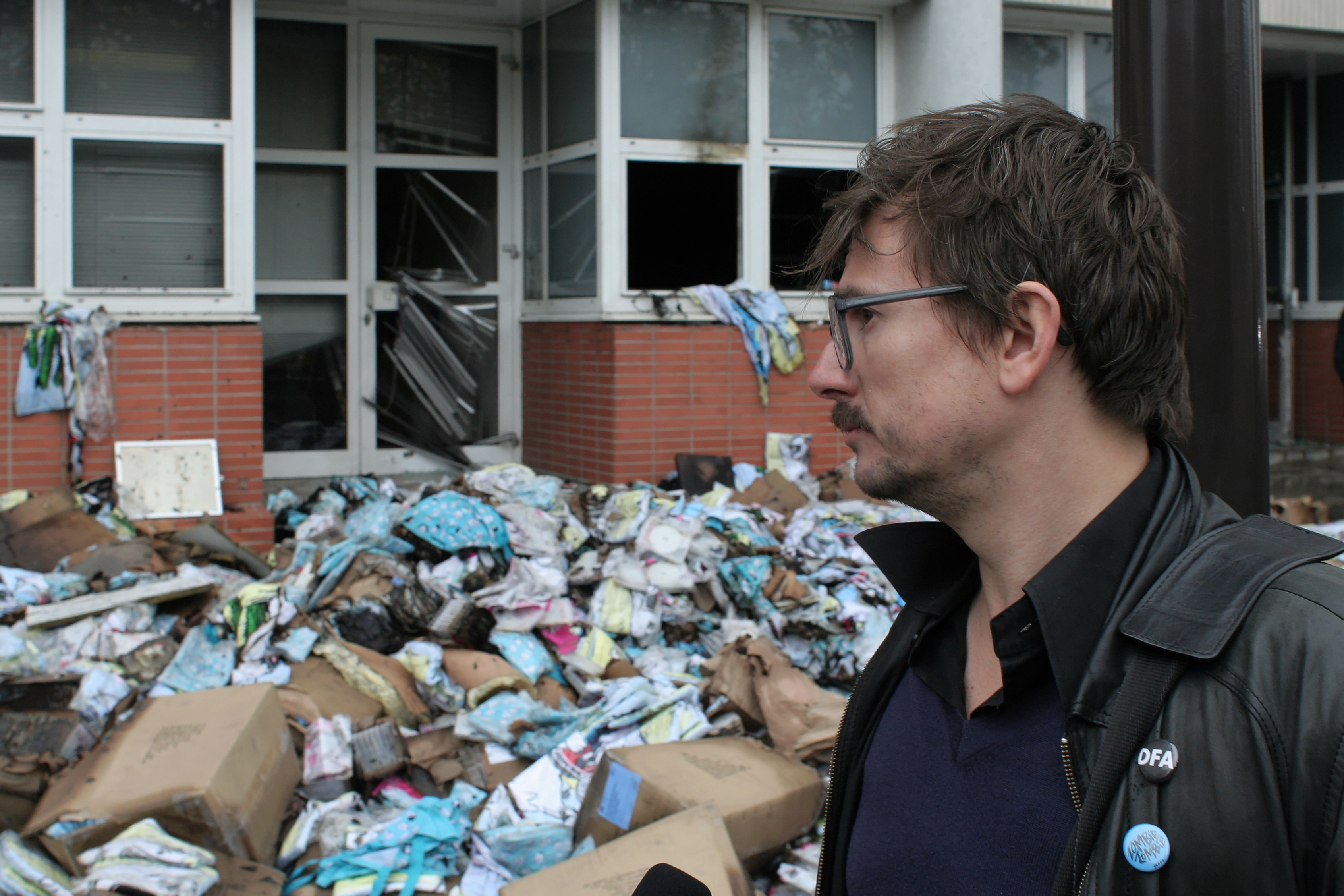 Incendie des locaux de Charlie Hebdo (62 boulevard Davout, Paris) le mercredi 2 novembre 2011. Luz répond aux journalistes devant les débris de l'incendie.